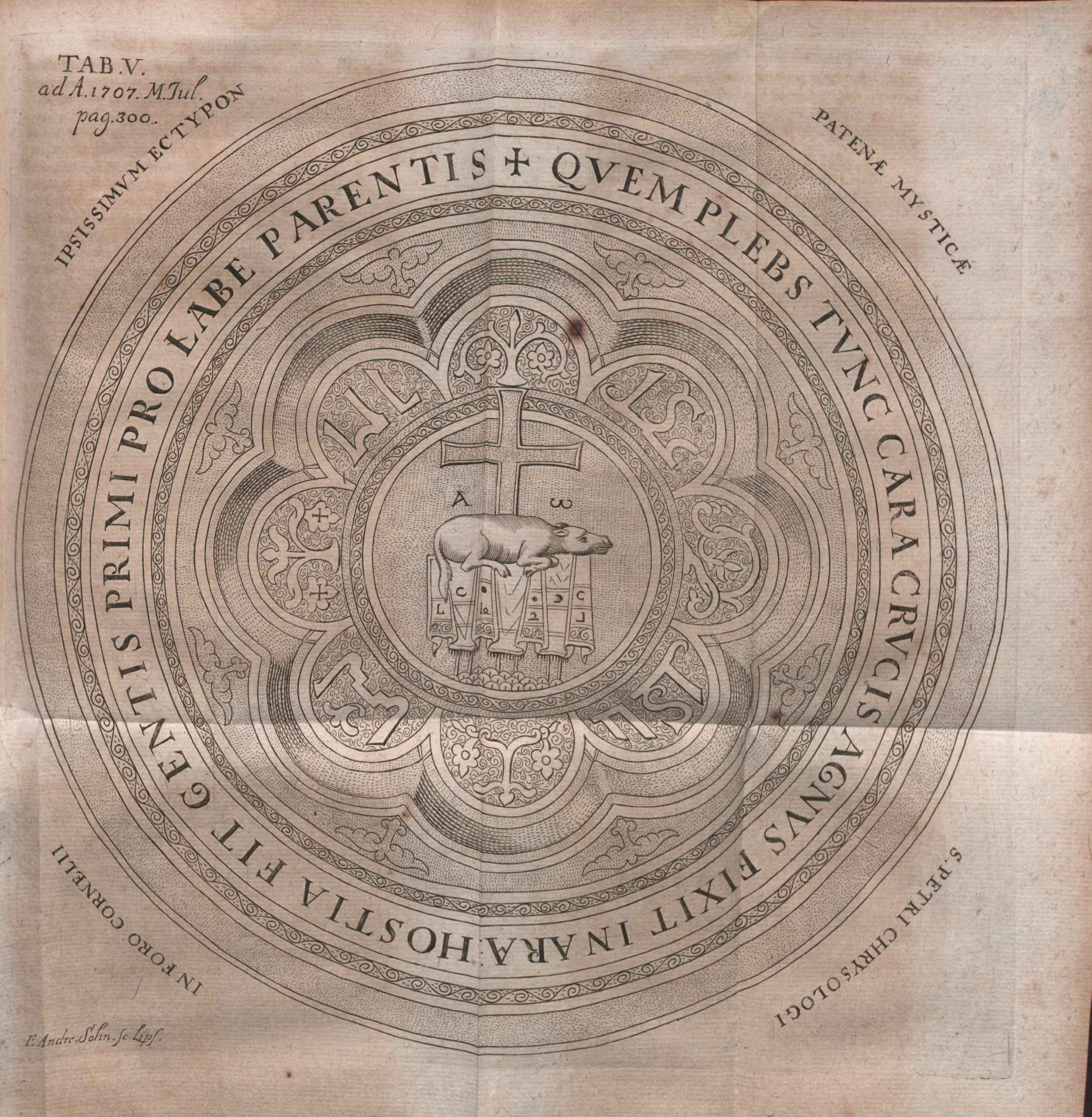 Illustration